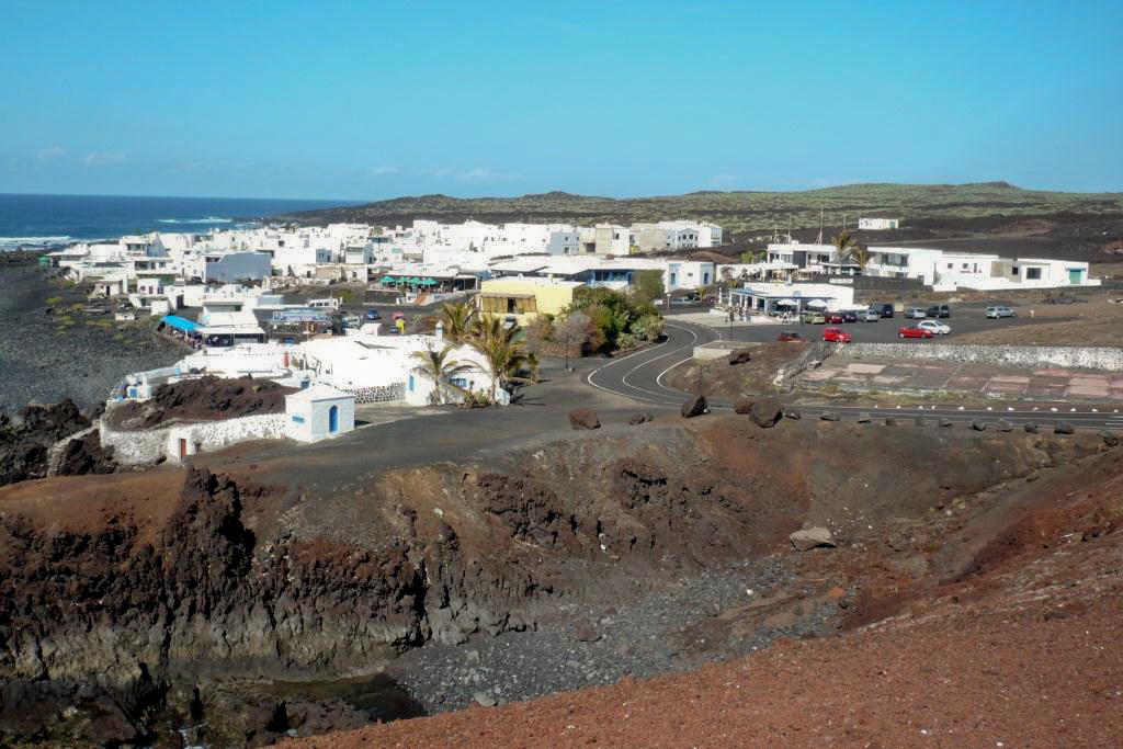 El Golfo, Ort im Süden der Kanareninsel Lanzarote